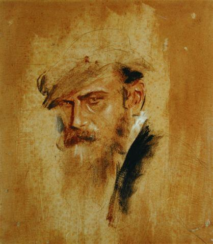 Franz von Lenbach, Selbstportrait